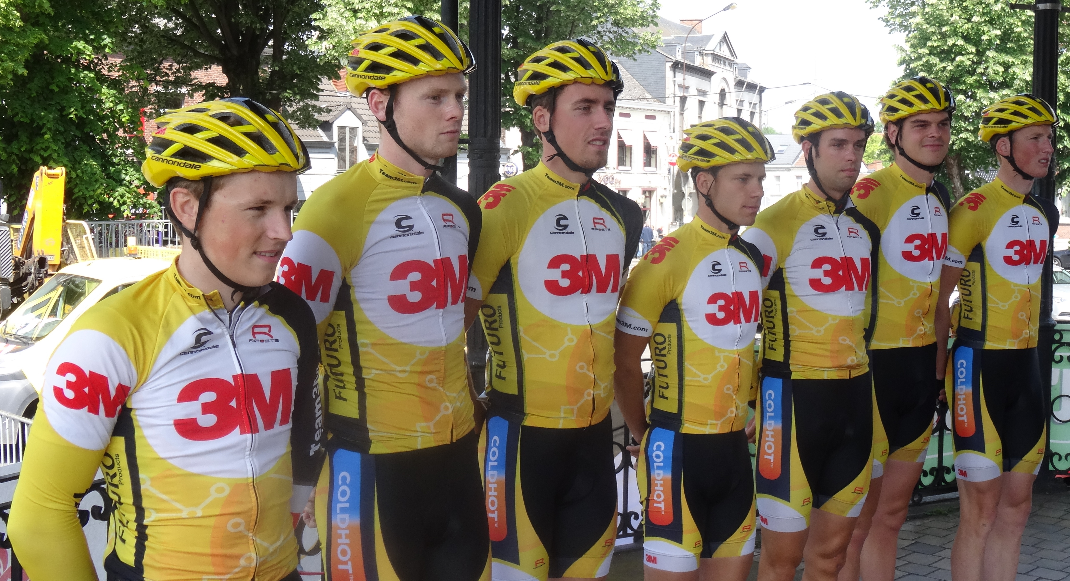 Reportage réalisé le samedi 17 mai à l'occasion du départ du Grand Prix Criquielion 2014 à Boussu, Belgique.